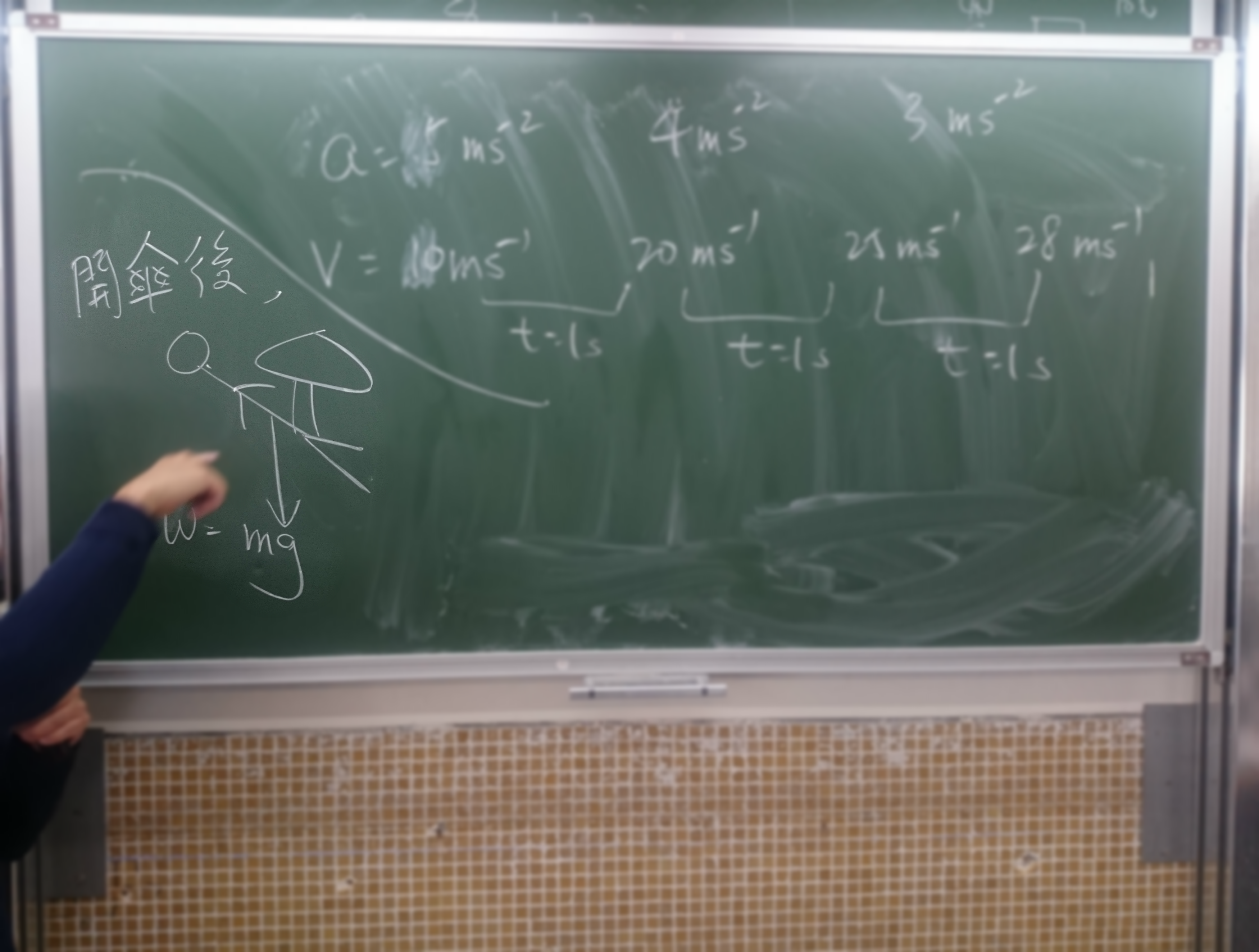 粵語: 呢個係2017年2月17號11點13分嘅一個葵循物理堂嘅黑板。